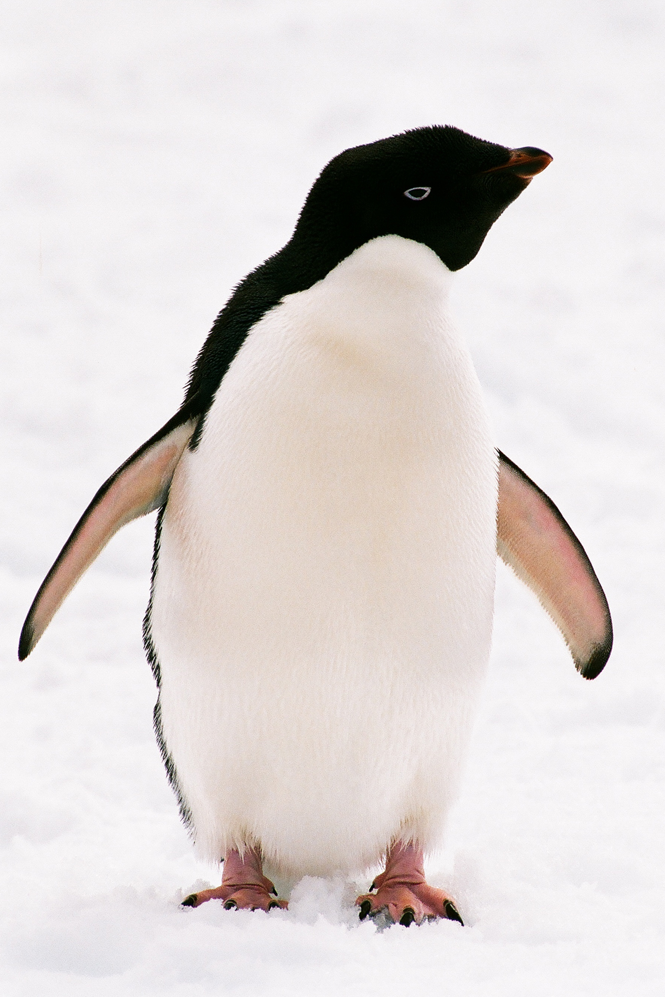 Adeliepinguin (Pygoscelis adeliae), fotografiert auf der chilenischen Antarktisstation Eduardo Frei auf King Georges Island